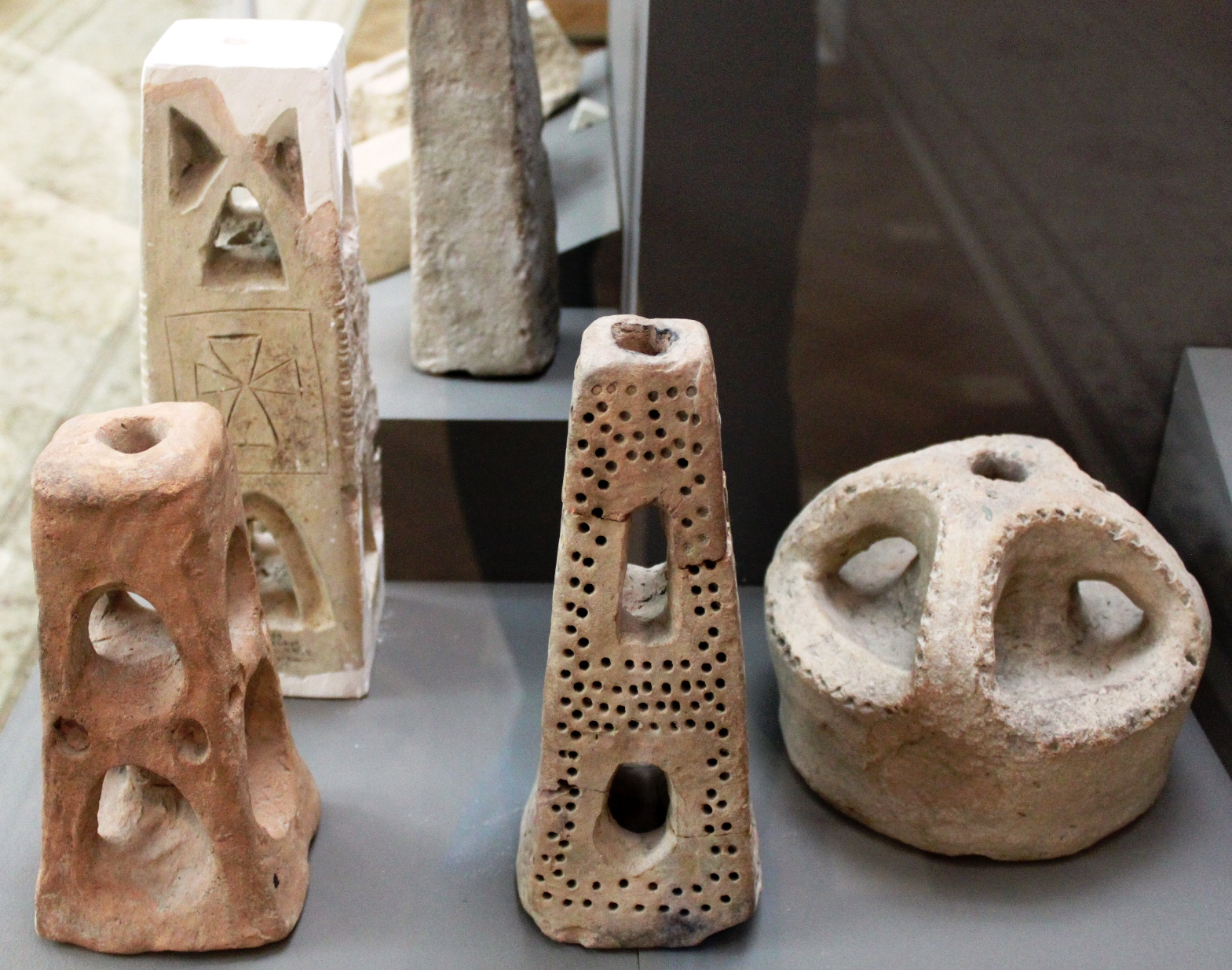 Предметы найденные в ходе археологических раскопок на территории Азербайджана.